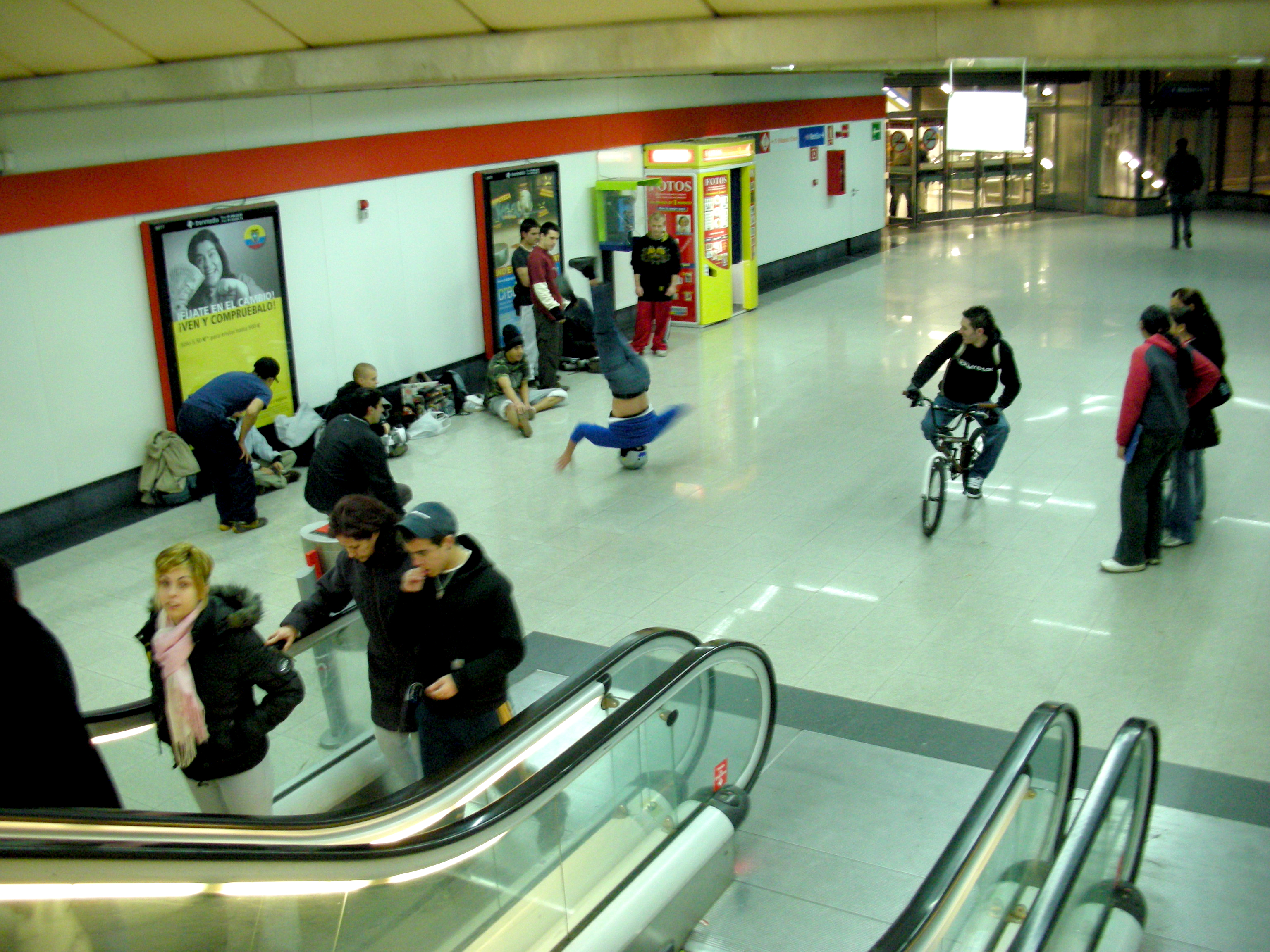 un chaval de cabeza en la estación de Móstoles practica break-dance captando la atención de las personas.